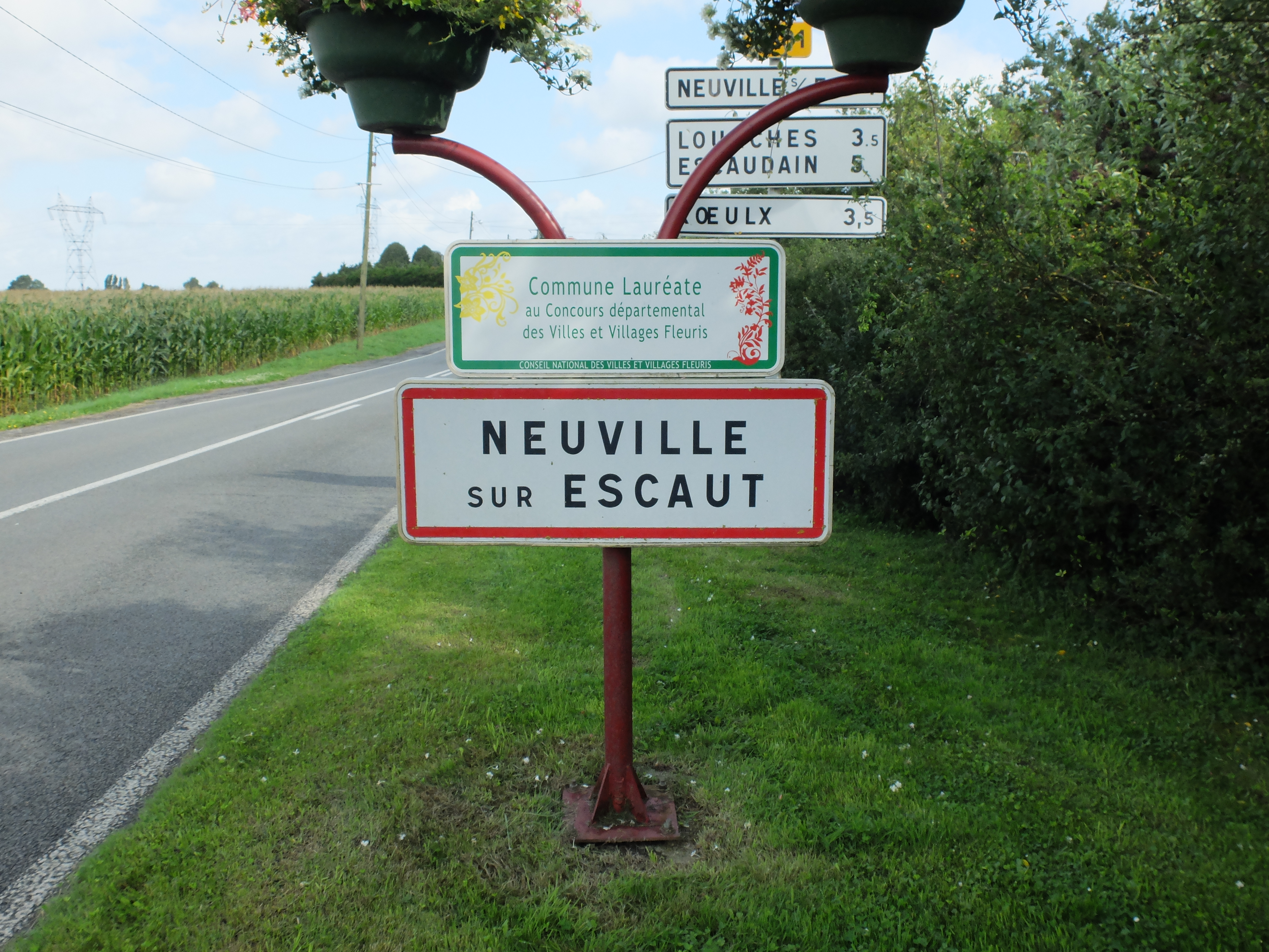 Vue d'une entrée de Neuville-sur-Escaut.